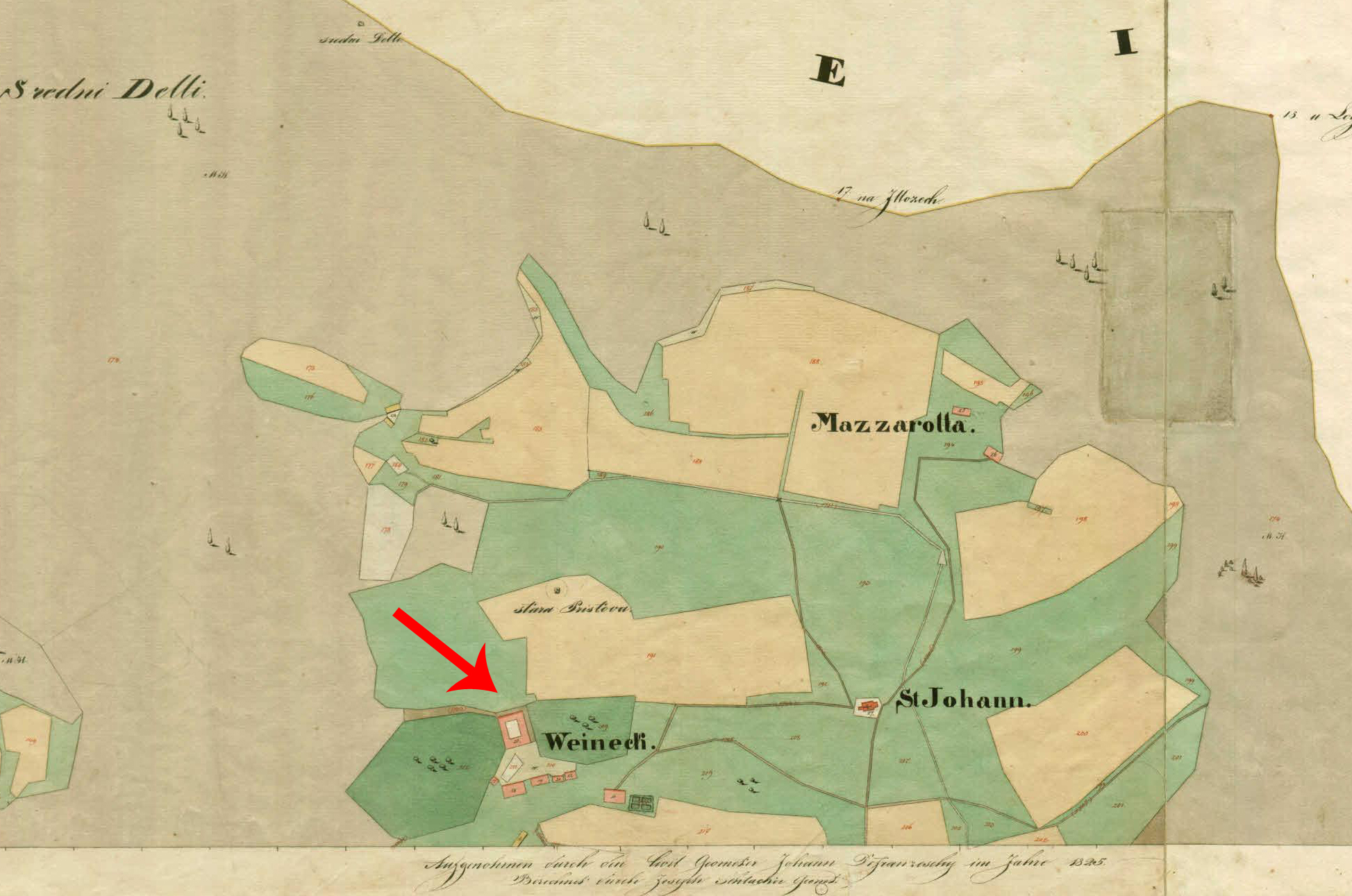 Franciscejski kataster za Kranjsko, 1823-1869